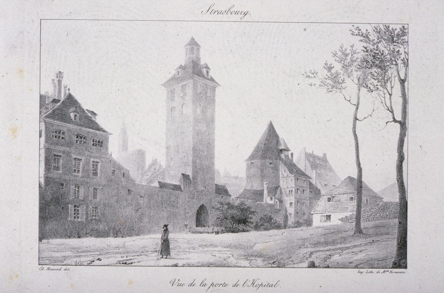 représentation de la Porte de l'Hôpital à Strasbourg